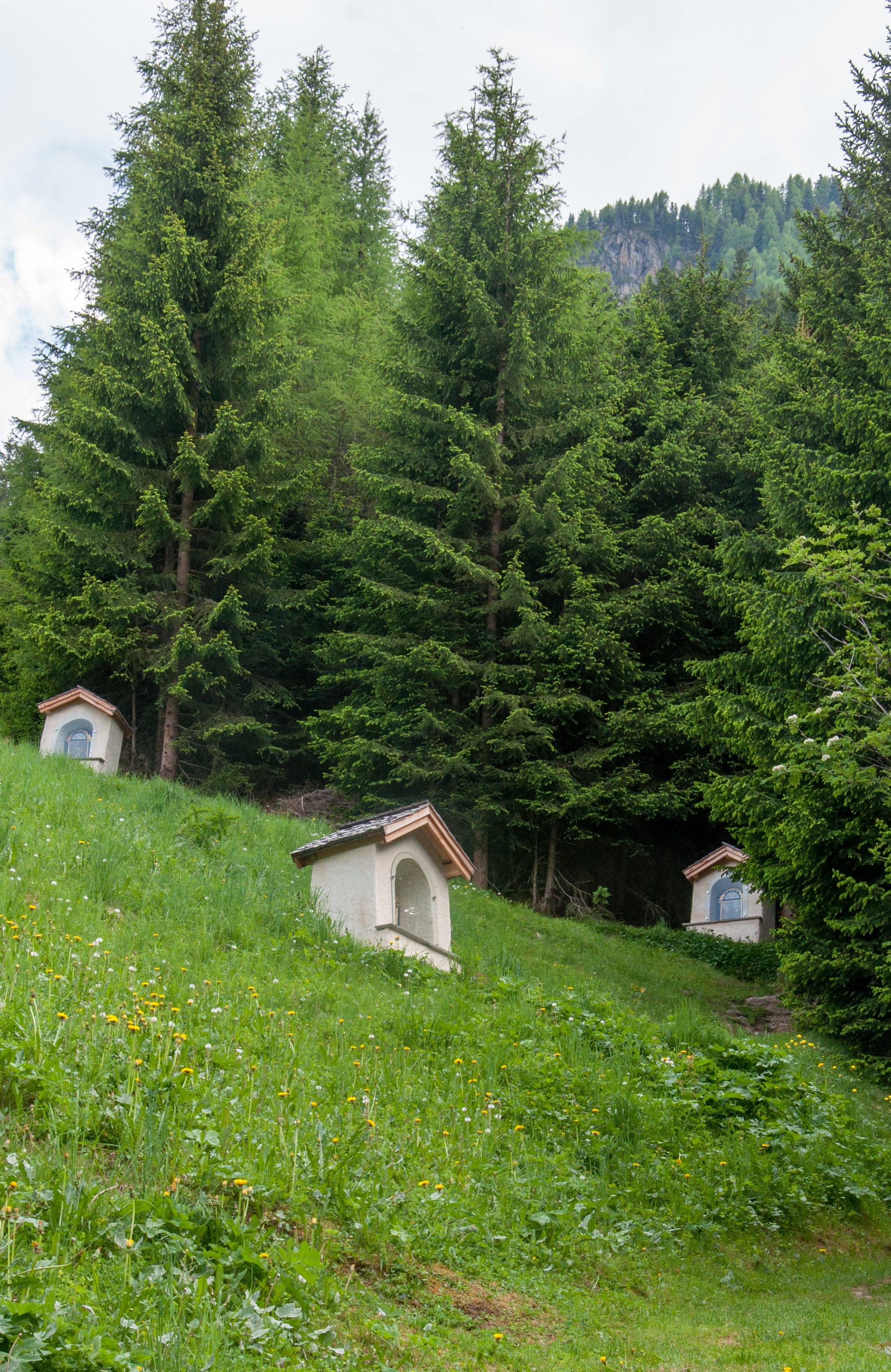 Kalvarienberggruppe und sieben Bildstöcke Ischgl